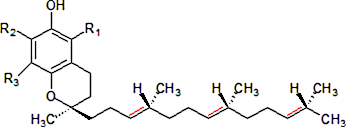 Structure de la vitamine E